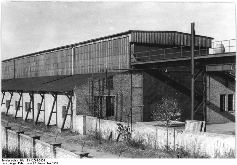 Berlin, Johannisthal, VEB - Kühlautomat Zentralbild Junge J-Ho. 1.11.1956 VEB - Kühlautomat Berlin-Johannisthal Blick auf Halle I.